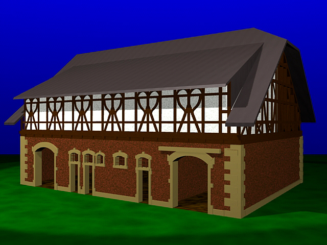 "Pferdestall Layenhof bei Mainz, Rekonstruktion"